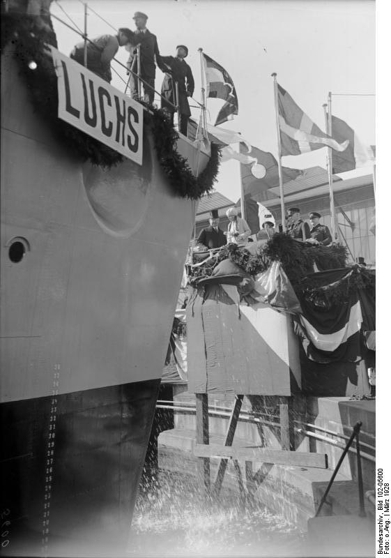 Die feierliche Taufe der 4 neuen deutschen Zerstörer "Tiger", "Lux", "Jagoa" und Leopard", auf der Staatswerft in Wilhelmshaven! Das Zerschellen der Champagnerflasche am Bug des neuen deutschen Torpedoboot-Zerstörers "Lux". Auf der Taufkanzel der Wilhelmshavener Stationschef Vizeadmiral Bauer.